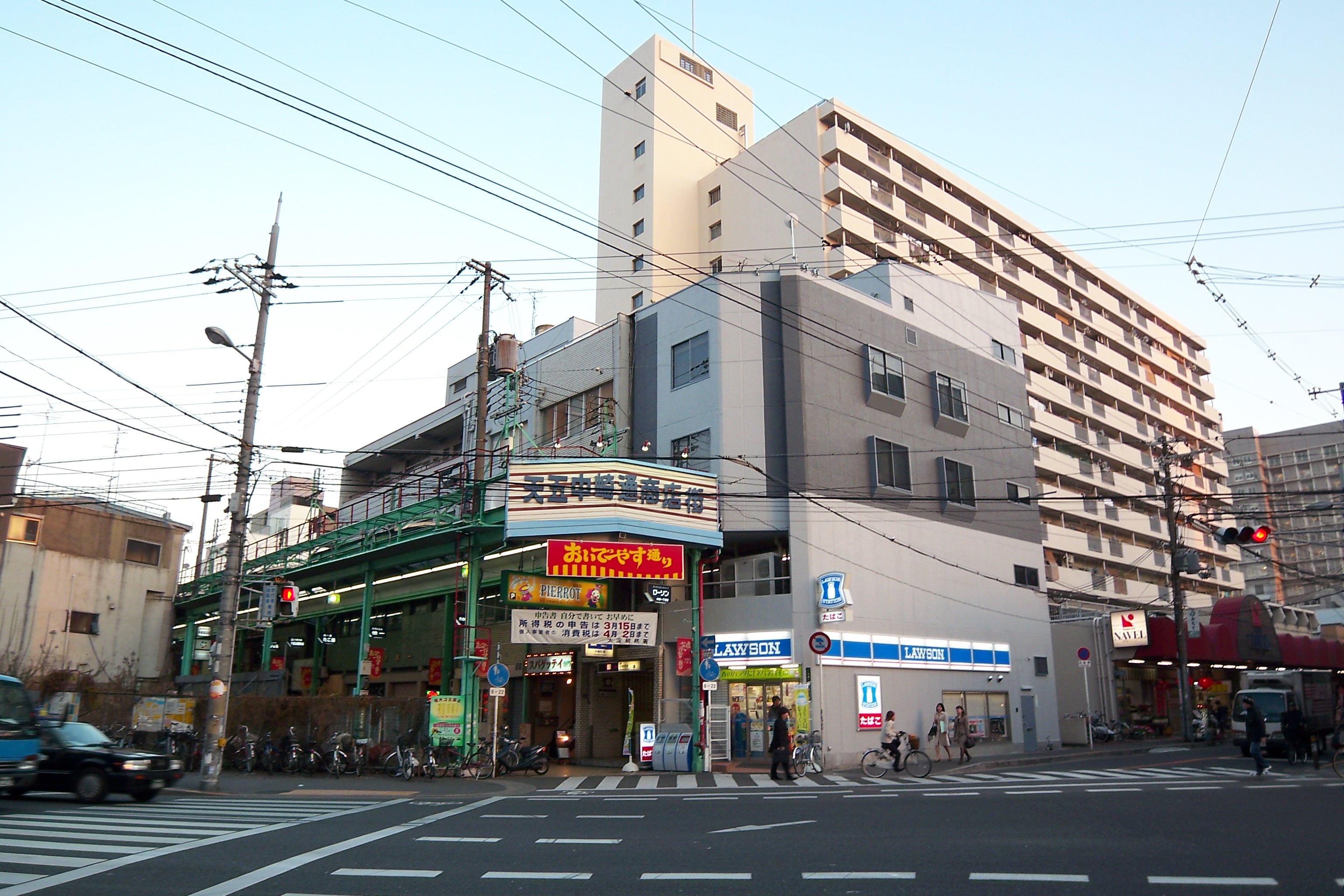 中崎町駅上（天五中崎通商店街・中崎コーポ）